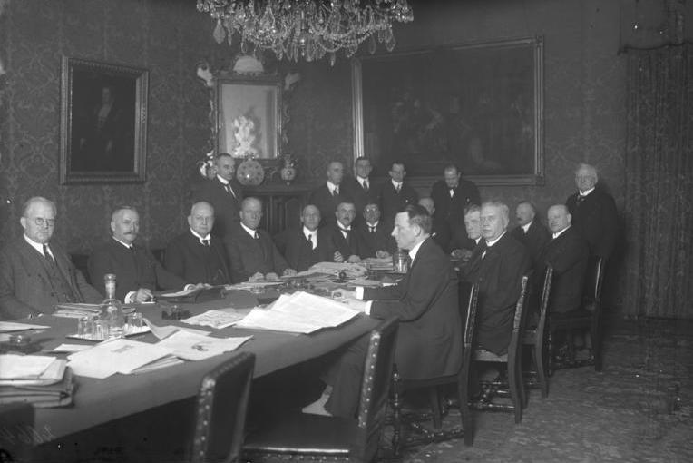 Das Kabinett Luther zurückgetreten. Das Kabinett bei wichtigen politsichen Besprechungen am "Grünen Tisch im Reichskanzler-Palais". von links nach rechts: Stingl, Reichspost; Schiele (Inneres) Dr. Luther, (Reichskanzler) Neuhaus (Reichswirtschafts). Dahinter die Staatssekretäre und Ministerialräte des Auswärtigen Amtes. Stehend ganz hinten rechts: Frenken (Reichsjustiz) rechts( neben ihm): Krohne (Reichsverkehr) Dr. Stresemann ( Aeusseres) v. Schlieben (Finanzen) Brauns (Reichsarbeitss) Graf Kanitz (Reichsernährung). Information added by Wikimedia users.Kabinett Luther I 15. Januar 1925 – 20. Januar 1926